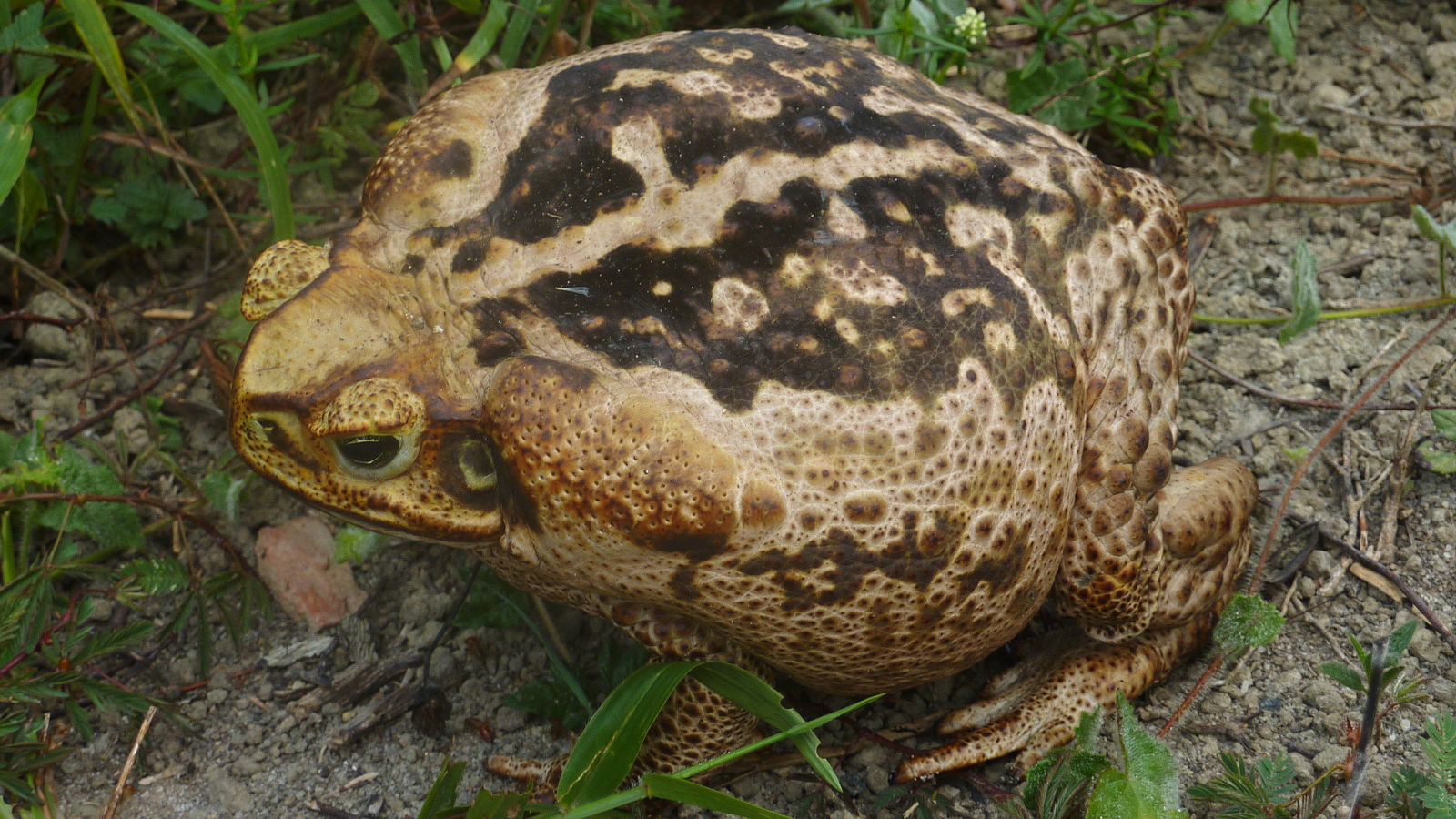 Bufo marinus